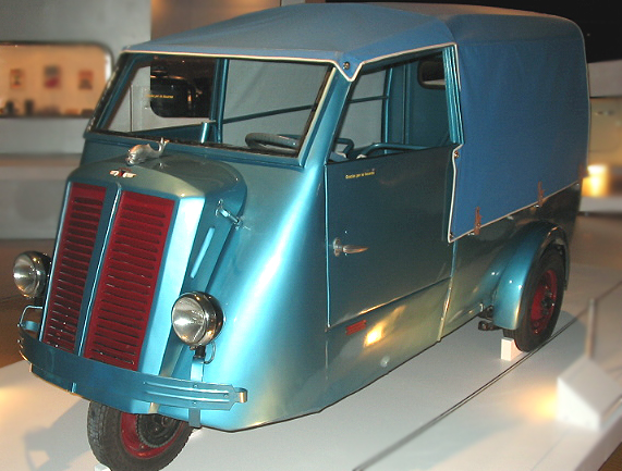 Delfín tricamioneta Fotografía digital realizada por p40p o Pablo Alberto Salguero Quiles Delfín tricamioneta Microcoches de España